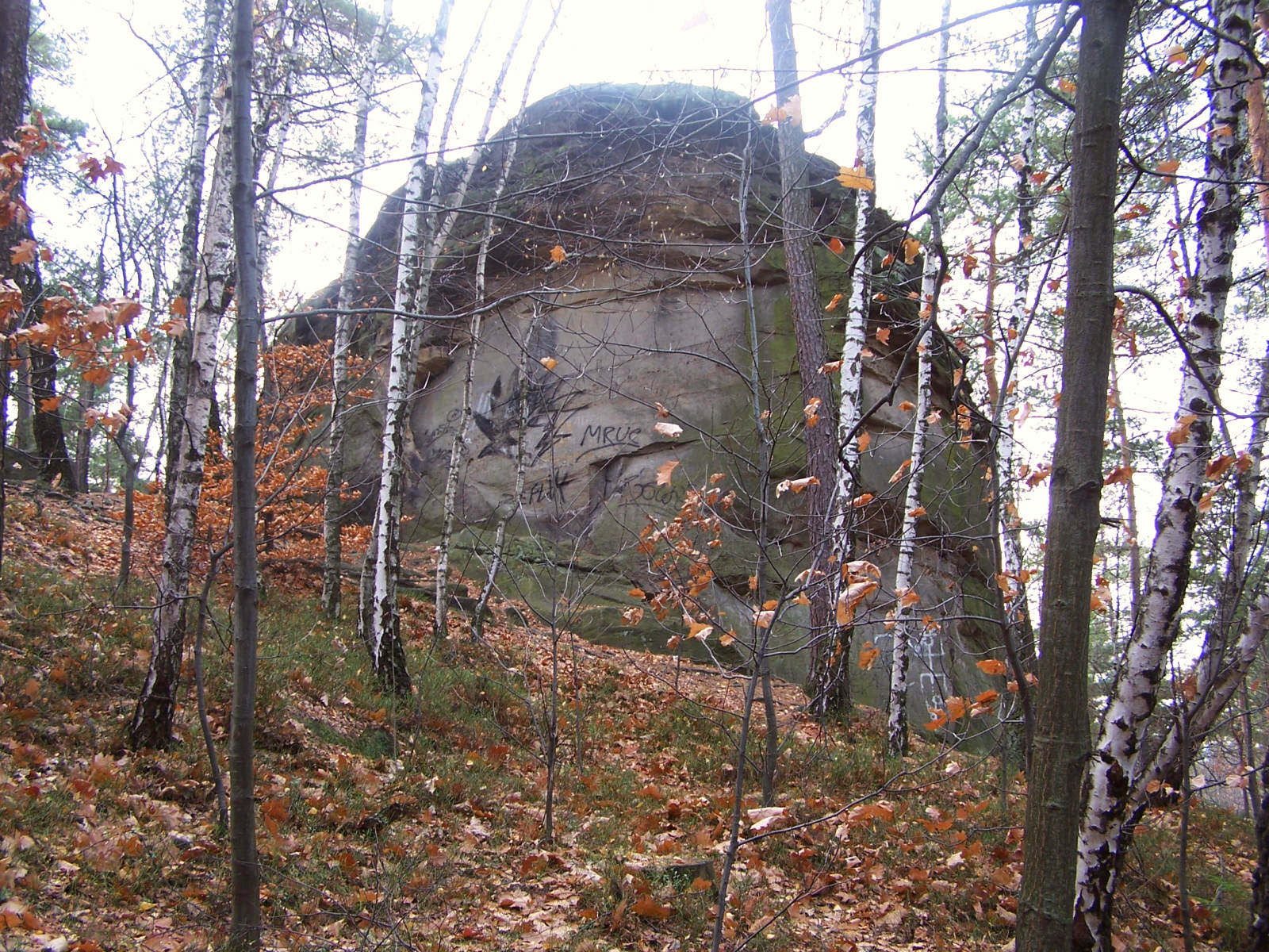 Kamienie Brodzińskiego (Paprotna, Pogórze Wiśnickie)